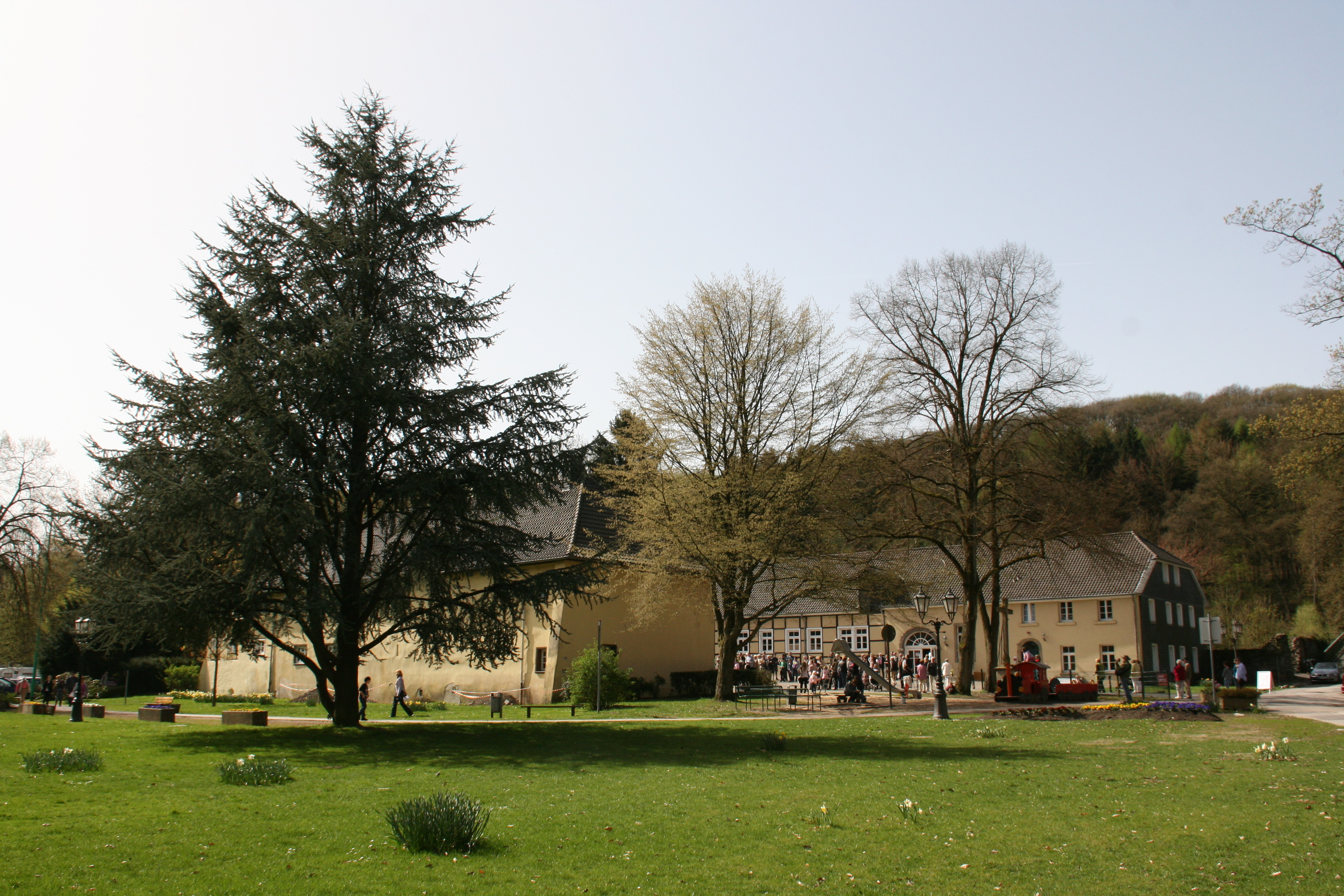 Narzissenfest auf Schloss Hardenberg in Velbert